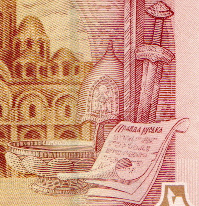 Збільшене зображення частини банкноти 2 гривні НБУ